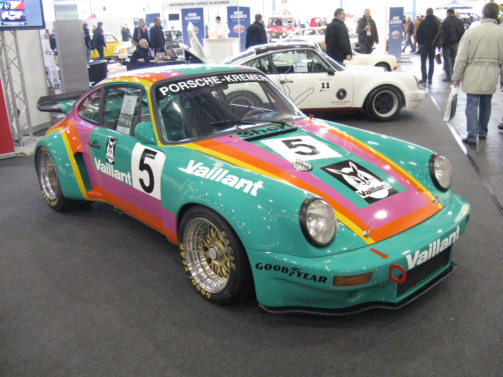 Porsche 911 RSR Kremer Racing